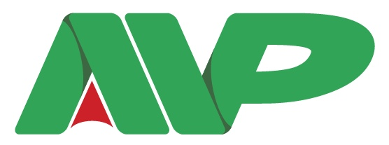 Logo van de politieke partij AVP Aruba